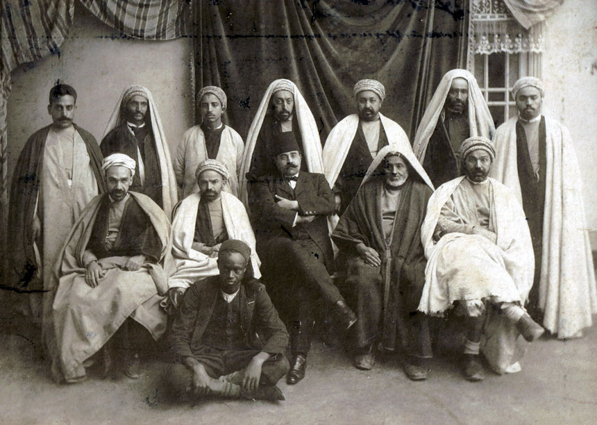 Comité de l'Union commerciale des djerbiens (au centre Abdeljelil Zaouche)